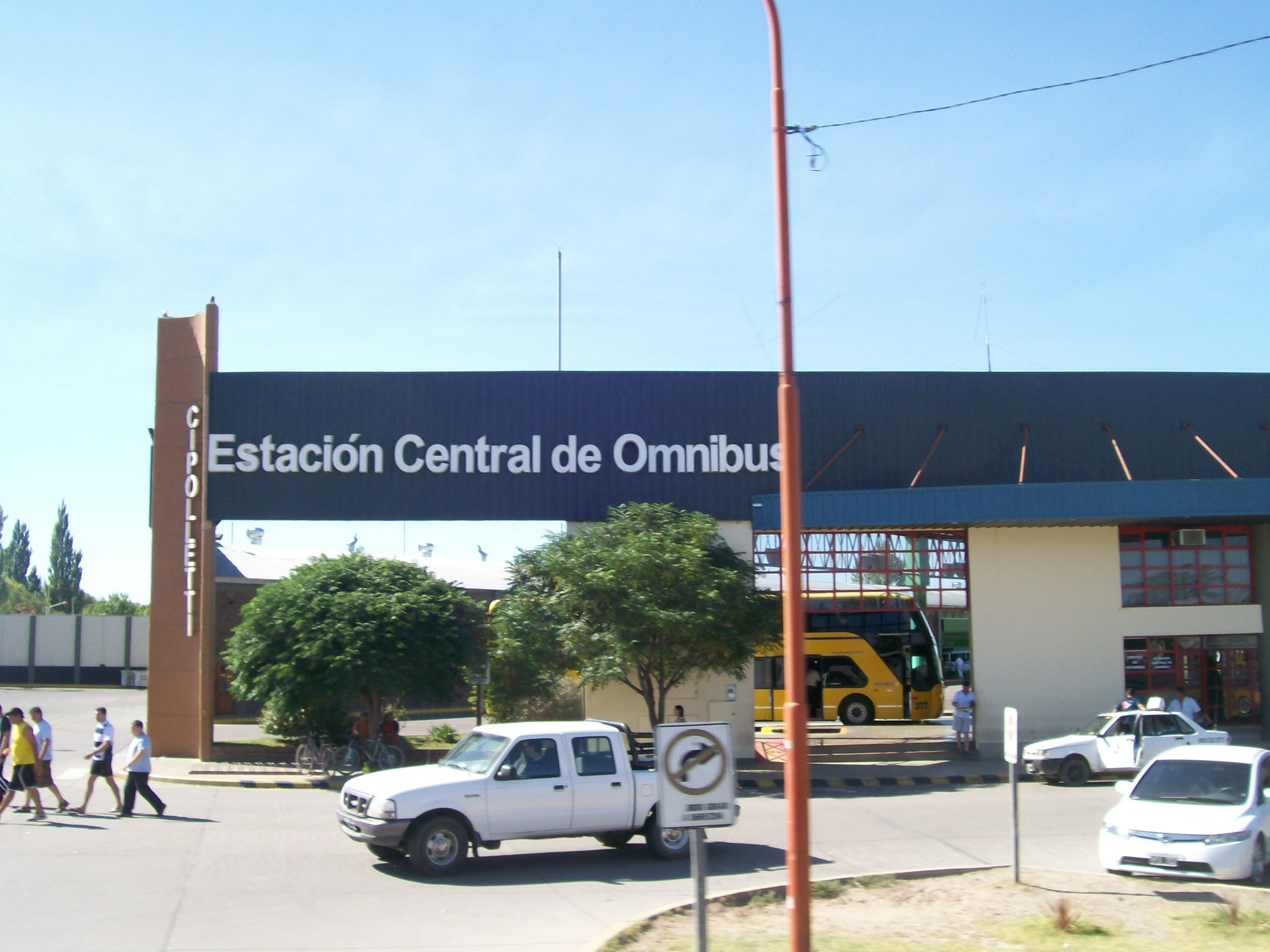 Terminal de micros de Cipolleti.